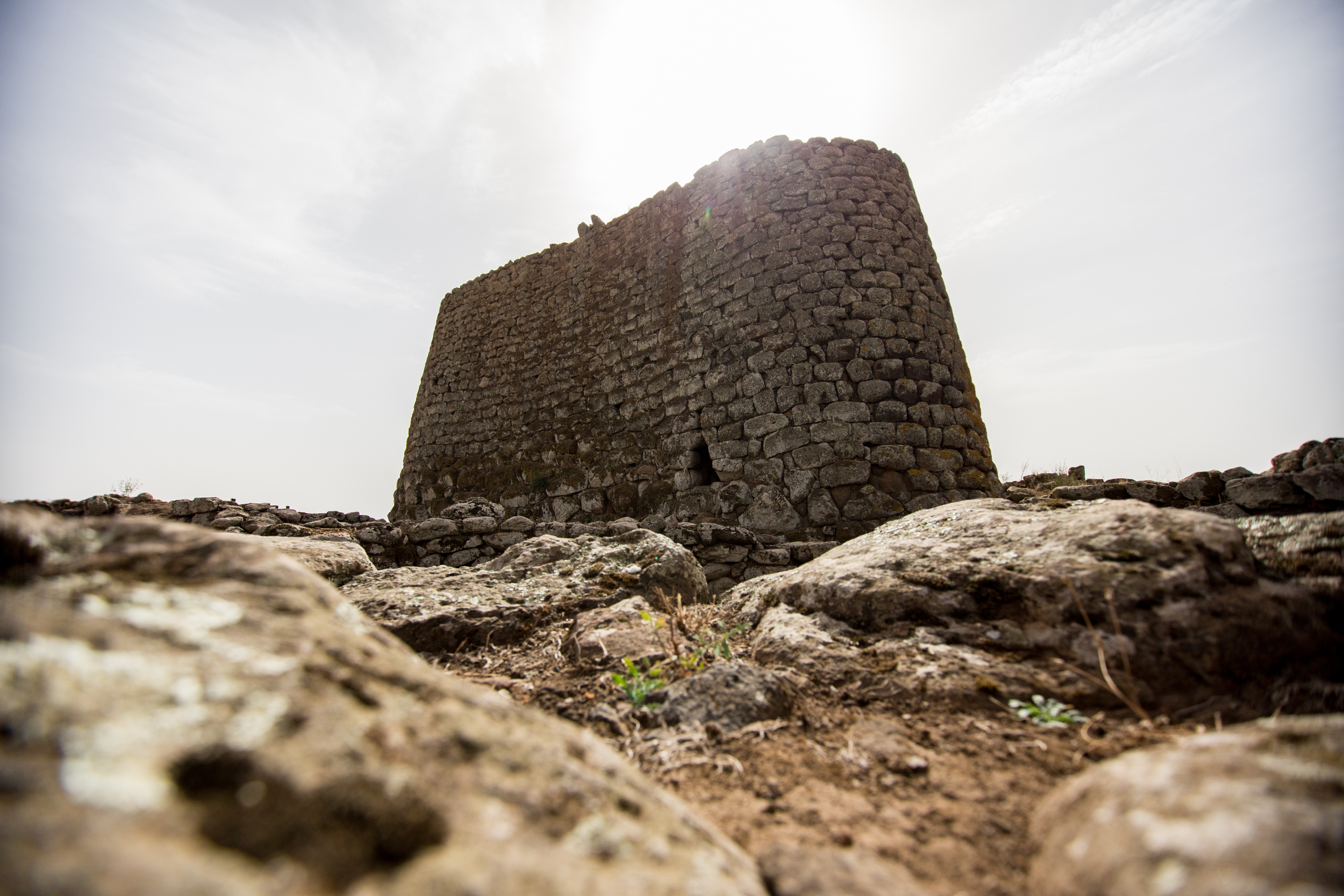 Nuraghe Losa (Abbasanta) This is a photo of a monument which is part of cultural heritage of Italy.